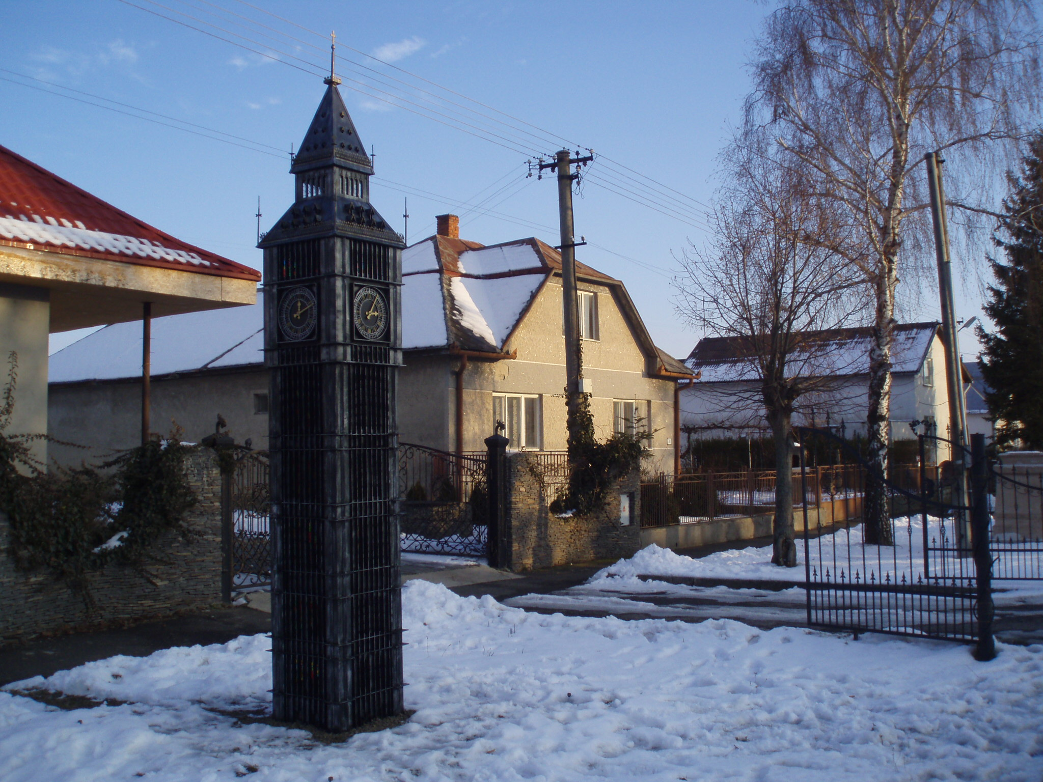 Zmenšenina Big Benu v obci Nový Ruskov okres Trebišov